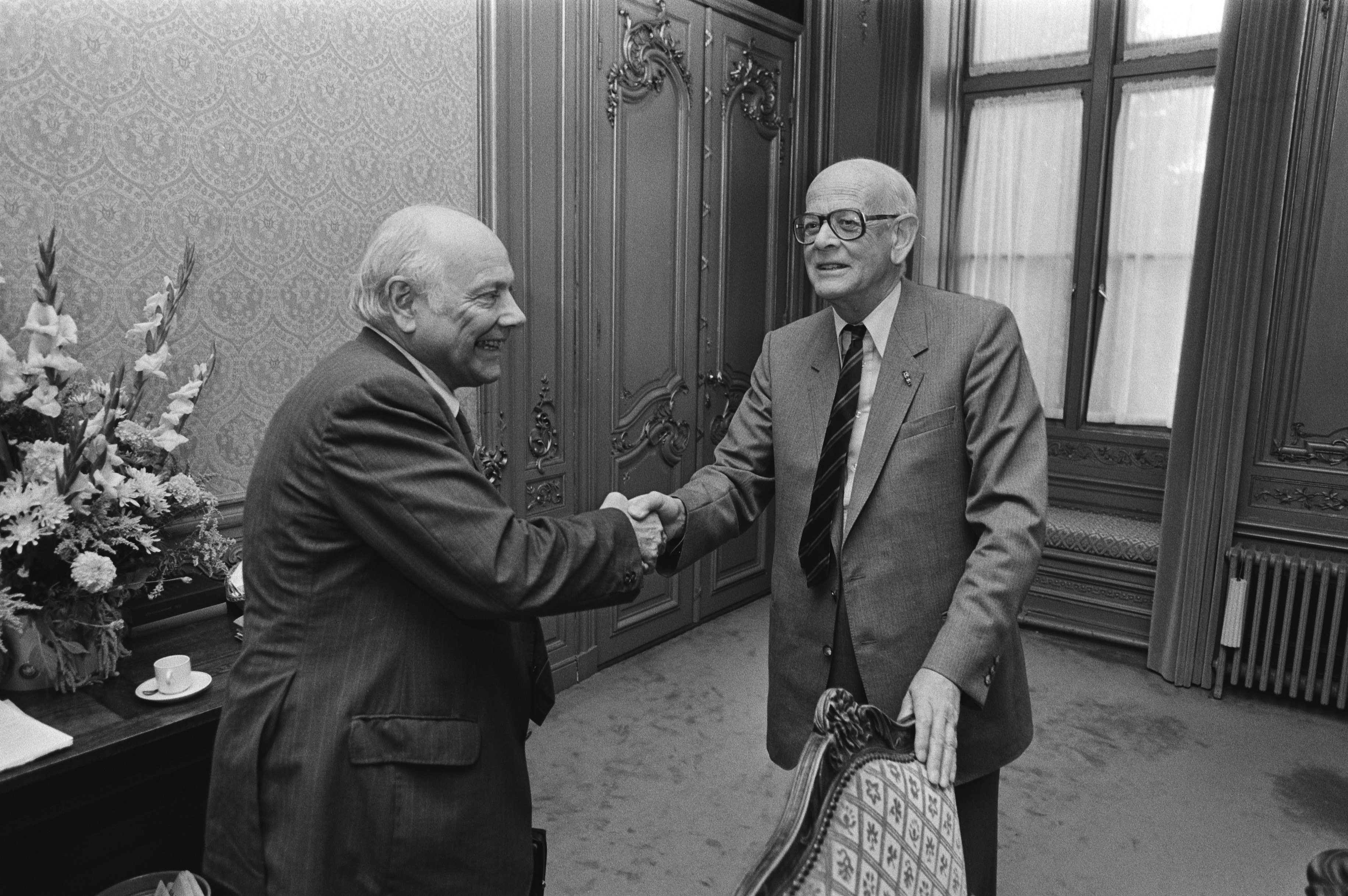 Collectie / Archief : Fotocollectie Anefo Reportage / Serie : Kabinetsformatie 1981 Beschrijving : PVDA fractievoorzitter Den Uyl (links) begroet informateur Wilhelm de Gaay (Gaius) Fortman (CDA) bij de kabinetsformatie van 1981 Datum : 27 augustus 1981 Locatie : Den Haag, Zuid-Holland Trefwoorden : kabinetsformaties, politici Persoonsnaam : Gaay Fortman, W.F. de, Uyl, Joop den Fotograaf : Antonisse, Marcel / Anefo, [onbekend] Auteursrechthebbende : Nationaal Archief Materiaalsoort : Negatief (zwart/wit) Nummer archiefinventaris : bekijk toegang 2.24.01.05 Bestanddeelnummer : 931-6465